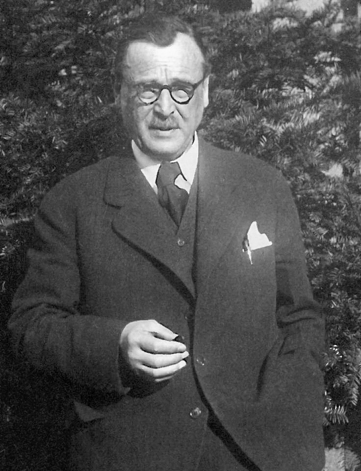 Portrait Friedrich Maase (1878–1959)